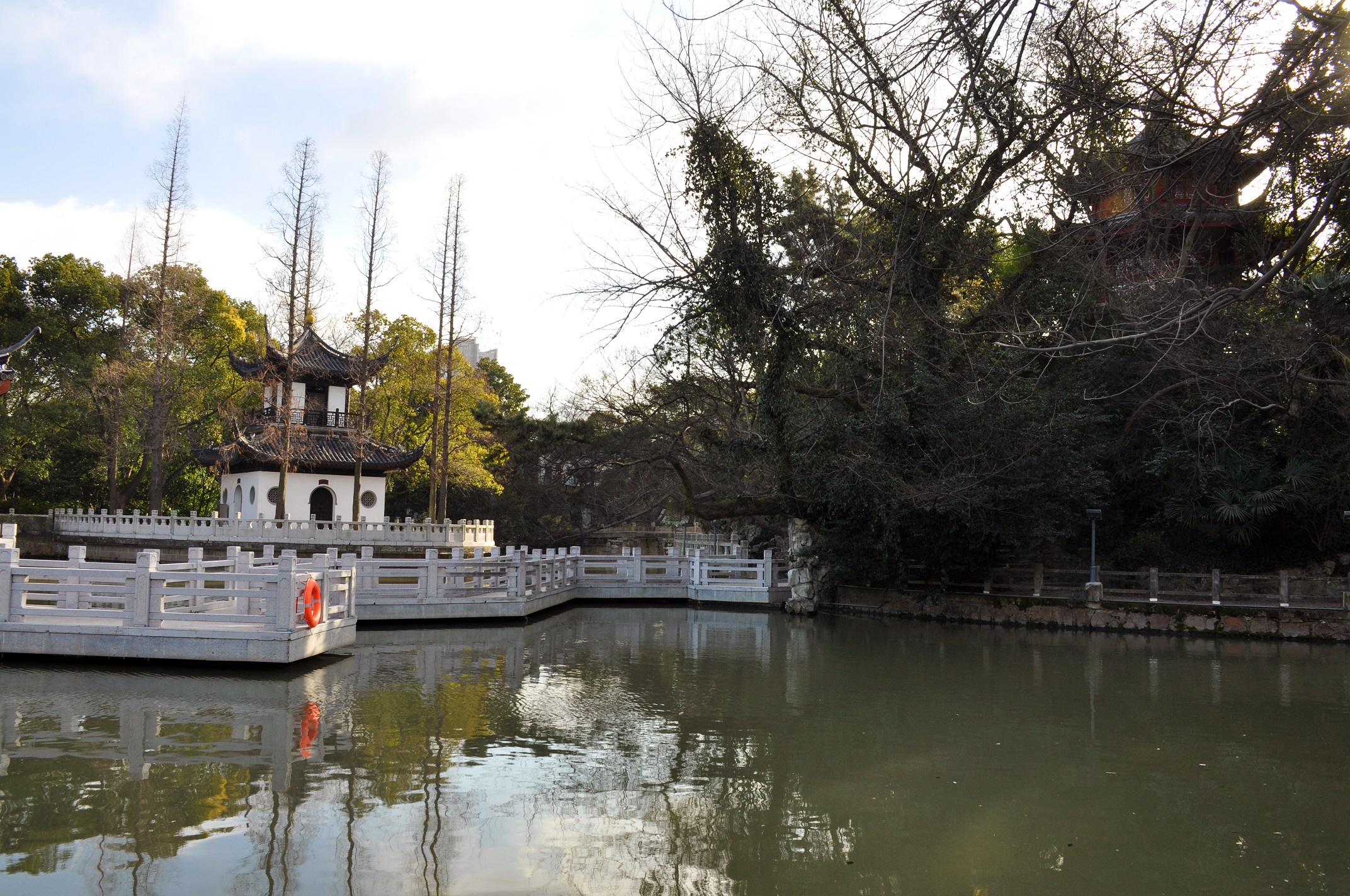 汇龙潭、应奎山、魁星阁 嘉定南大街嘉定孔庙前